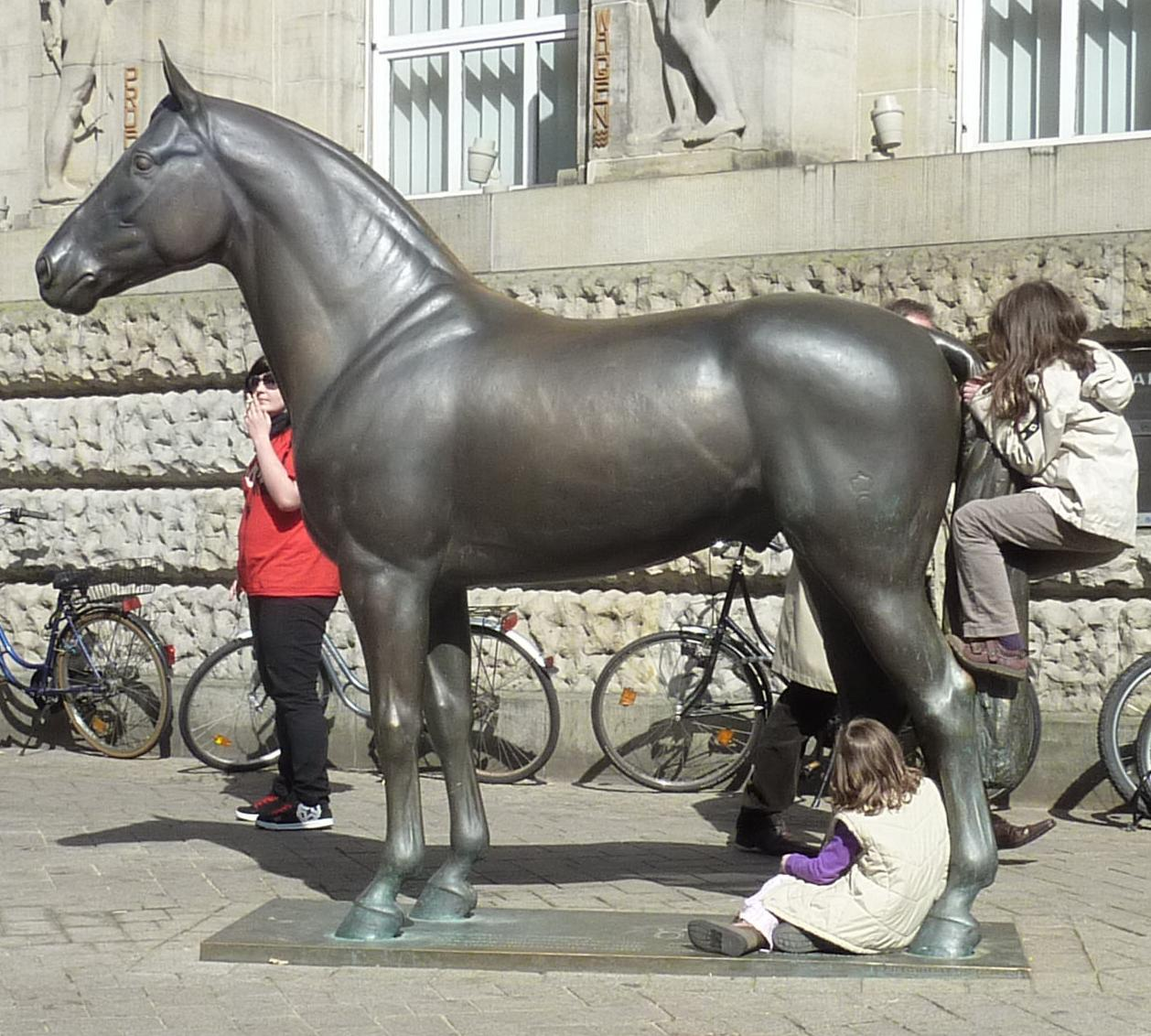 Statue des Oldenburger Hengstes Donnerhall in Oldenburg (Old.).